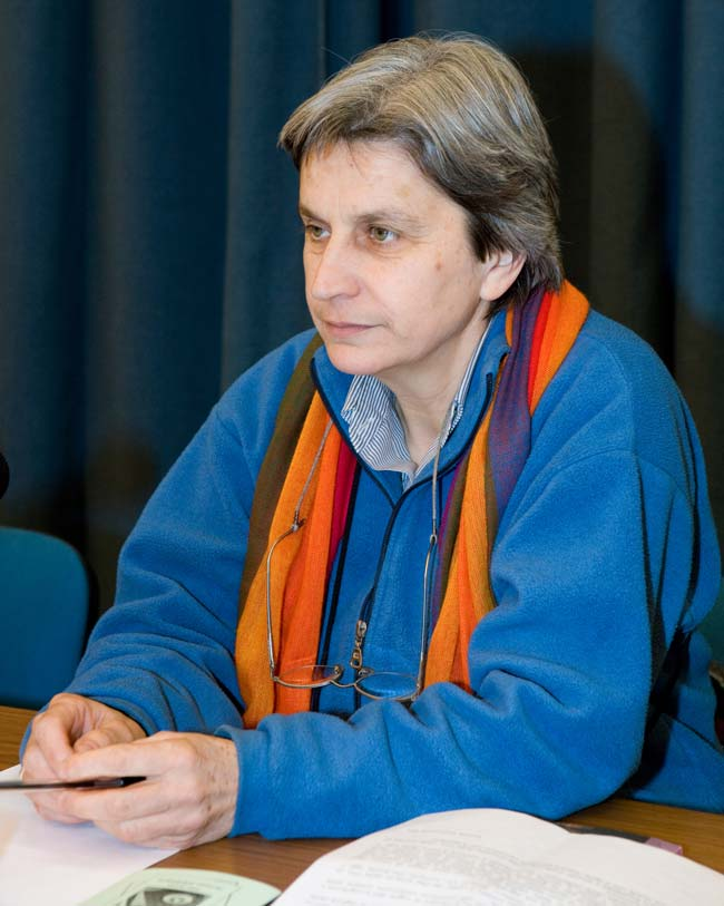 Ritratto di suor Rita Giaretta